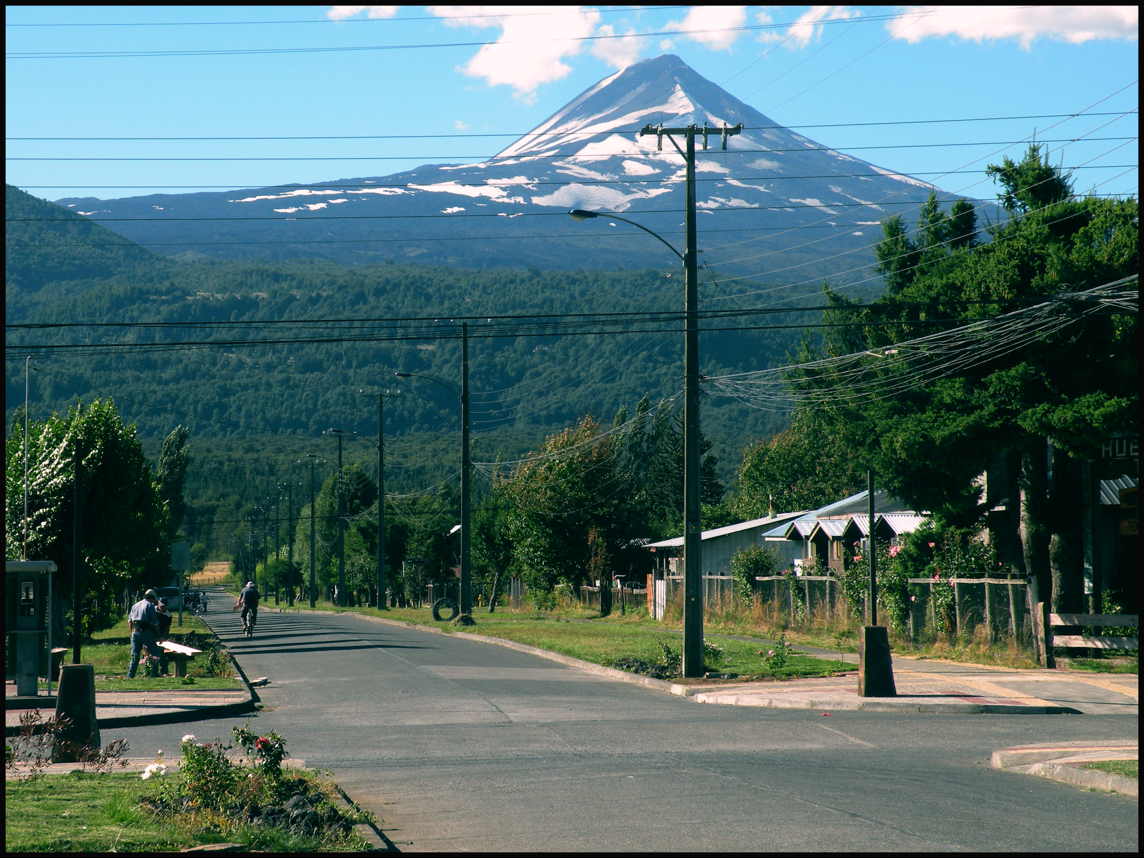 Zoom Al Llaima.